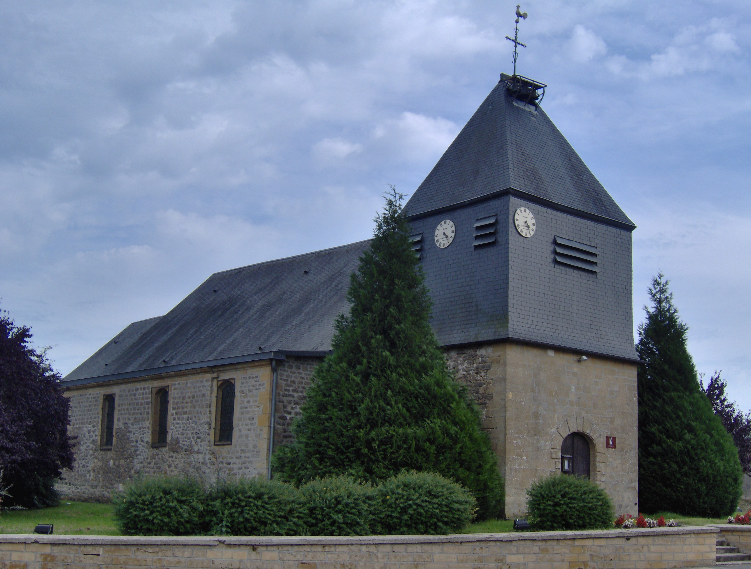 Eglise de Sauville, Ardennes, France